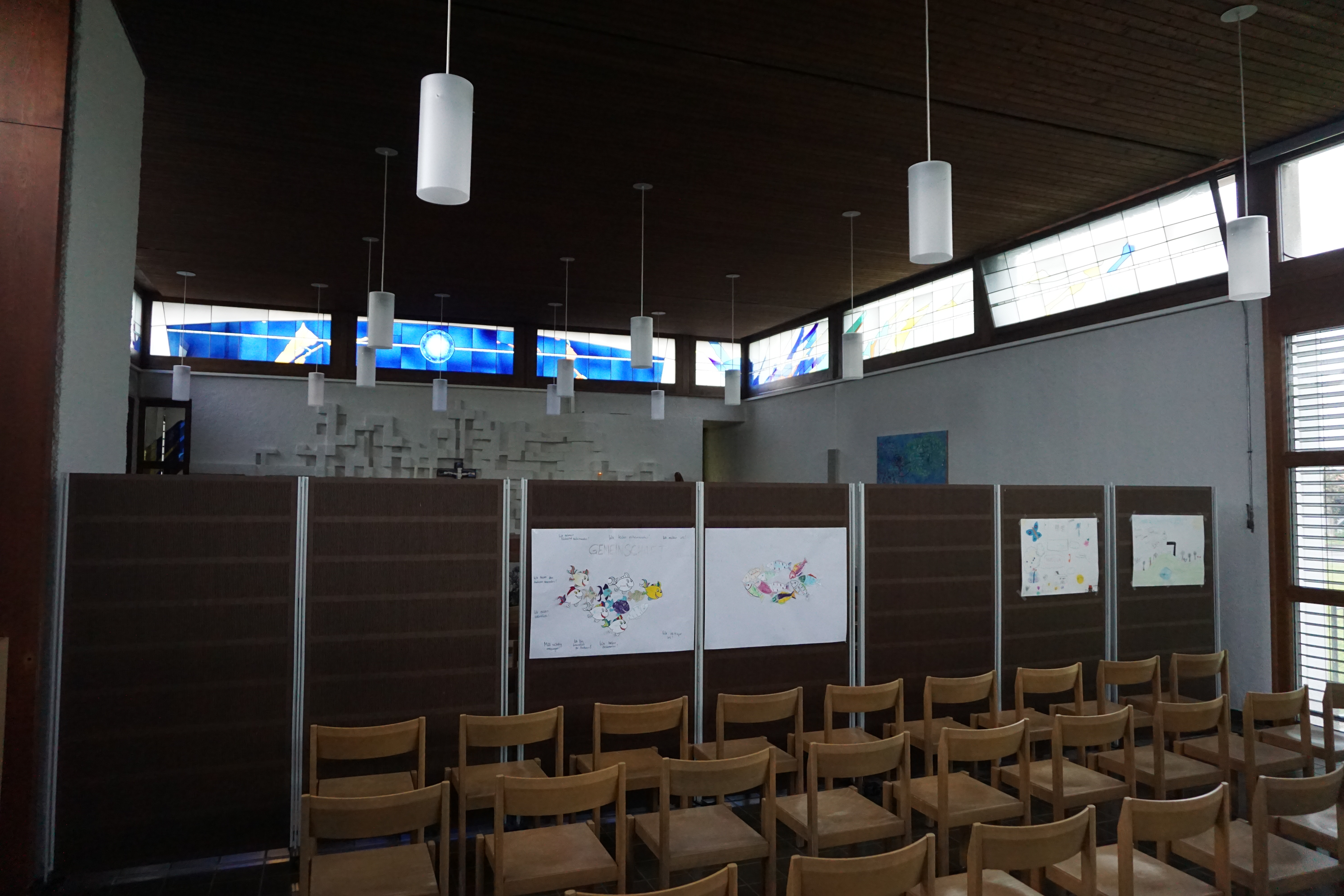 Innenraum mit Trennwand der Peter und Paulkirche